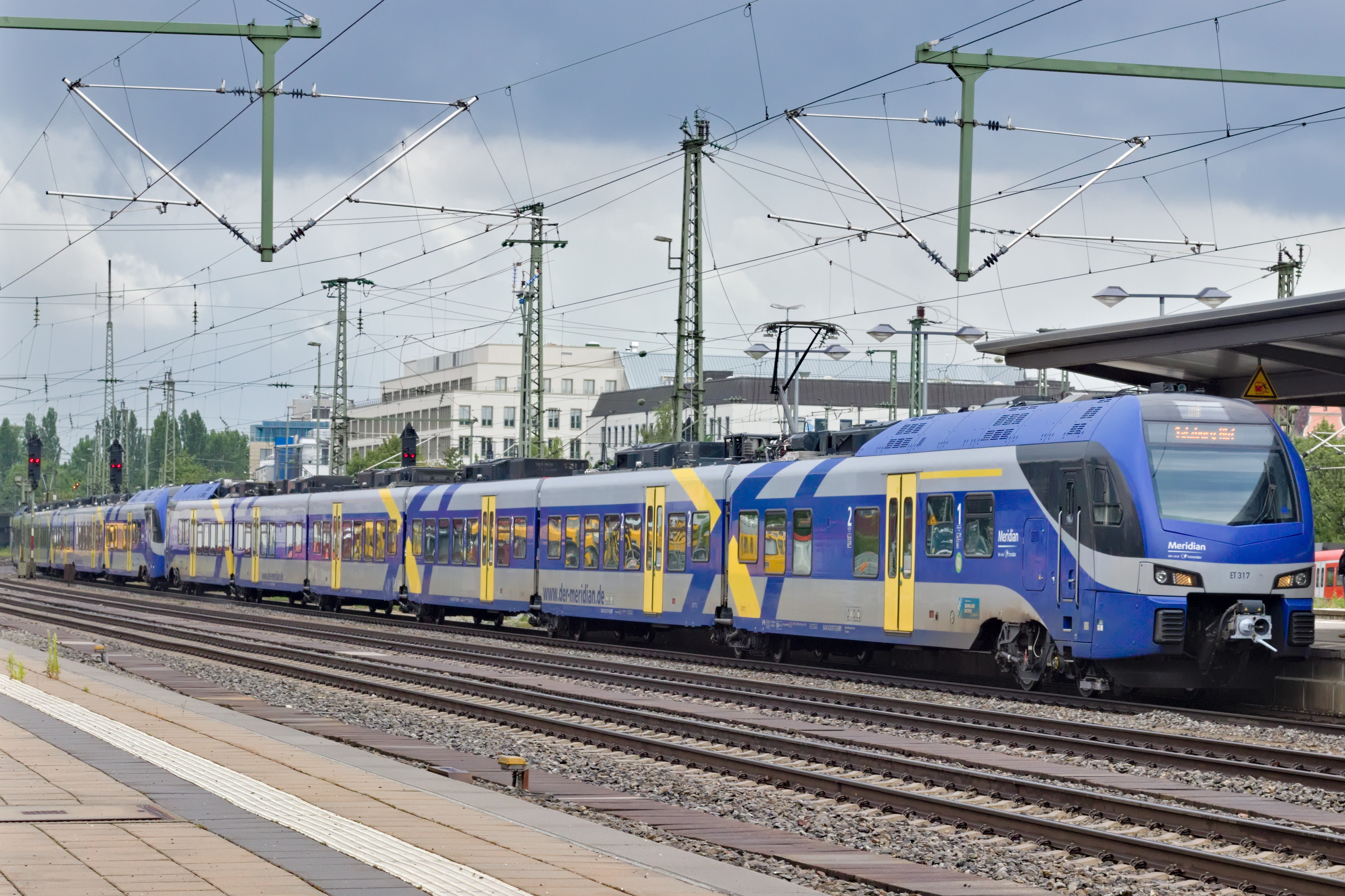 Meridian ET 317 mit ET 320 bei der Einfahrt am Münchener Ostbahnhof mit Fahrziel Salzburg.